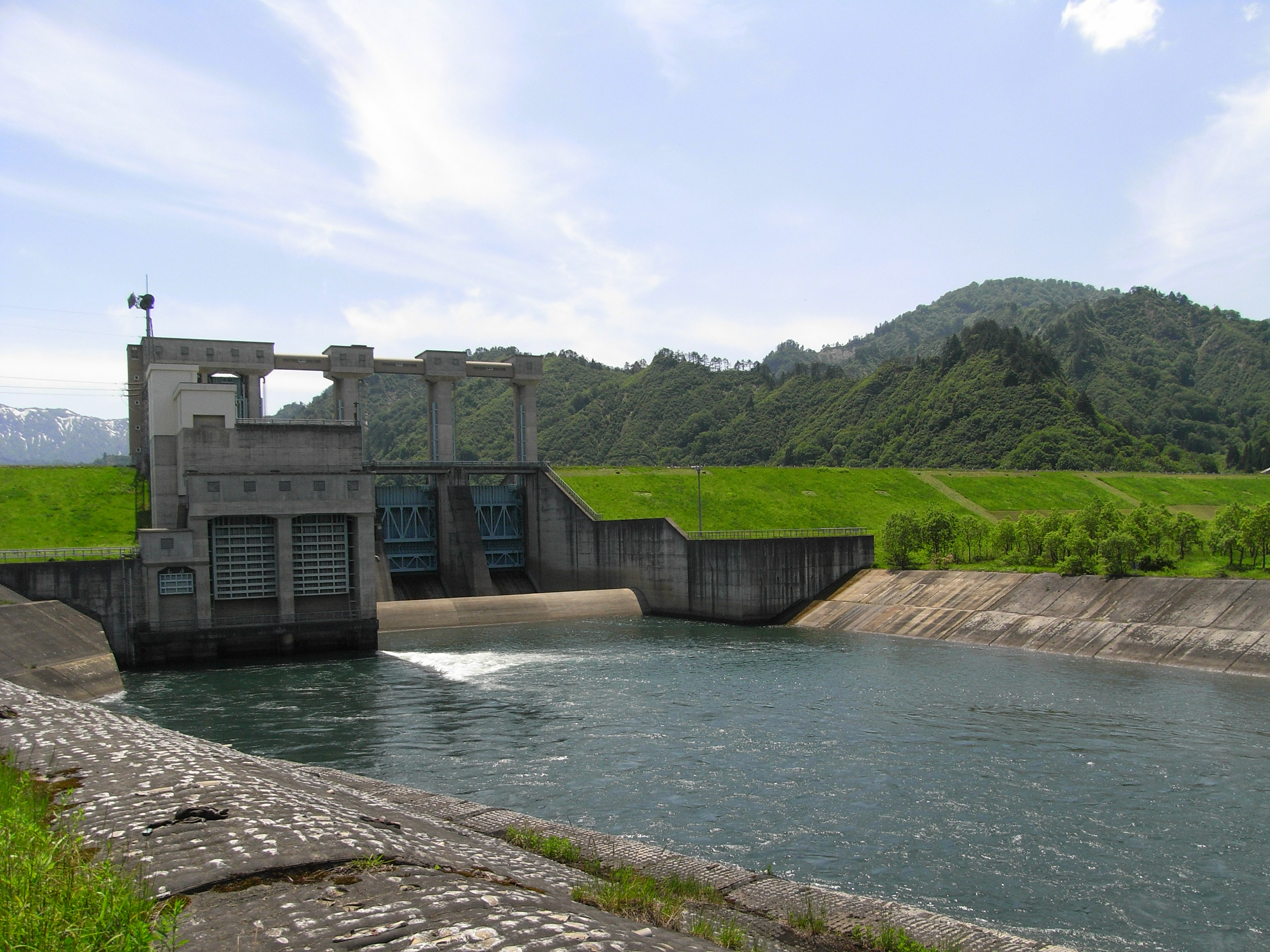 Dam